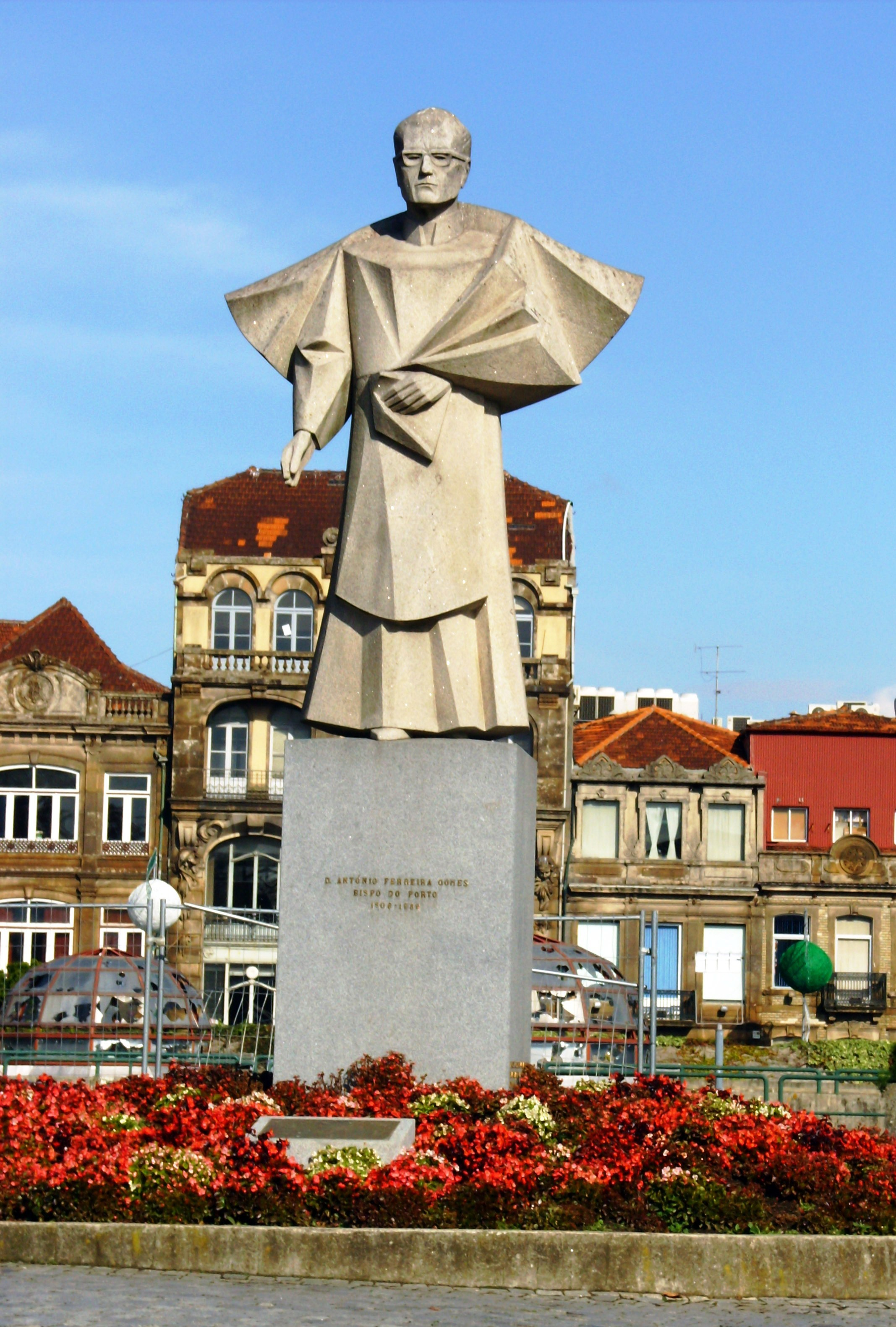 António Ferreira Gomes, bispo do Porto: estátua de autoria do escultor Arlindo Rocha, na cidade do Porto, Portugal.